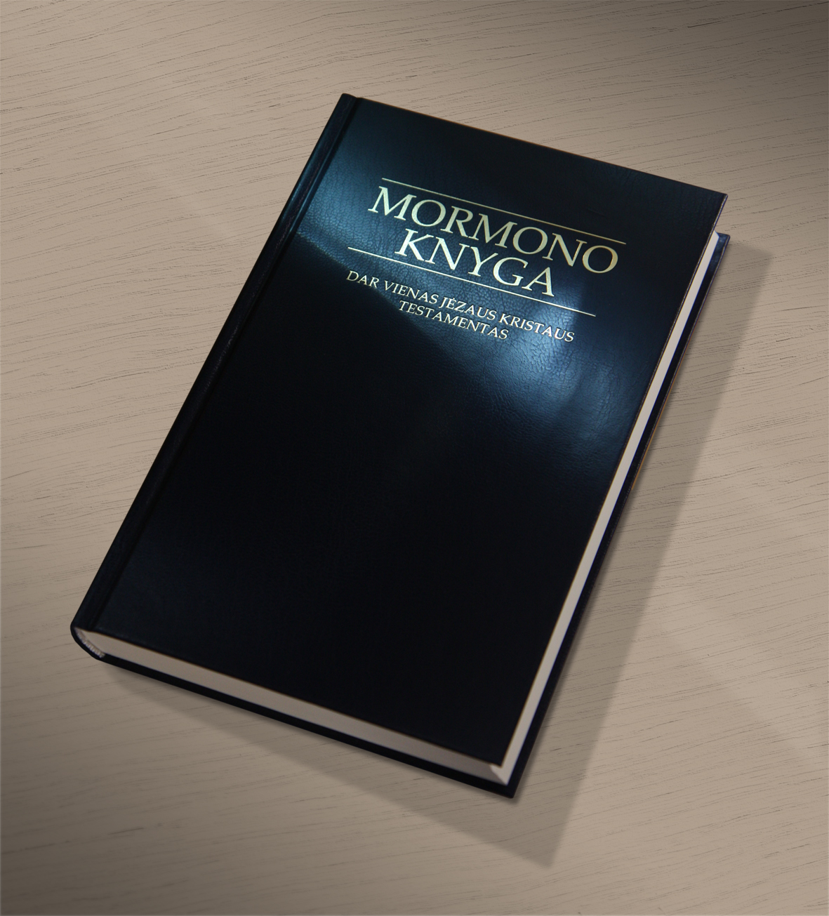 Mormono Knyga lietuvių kalba